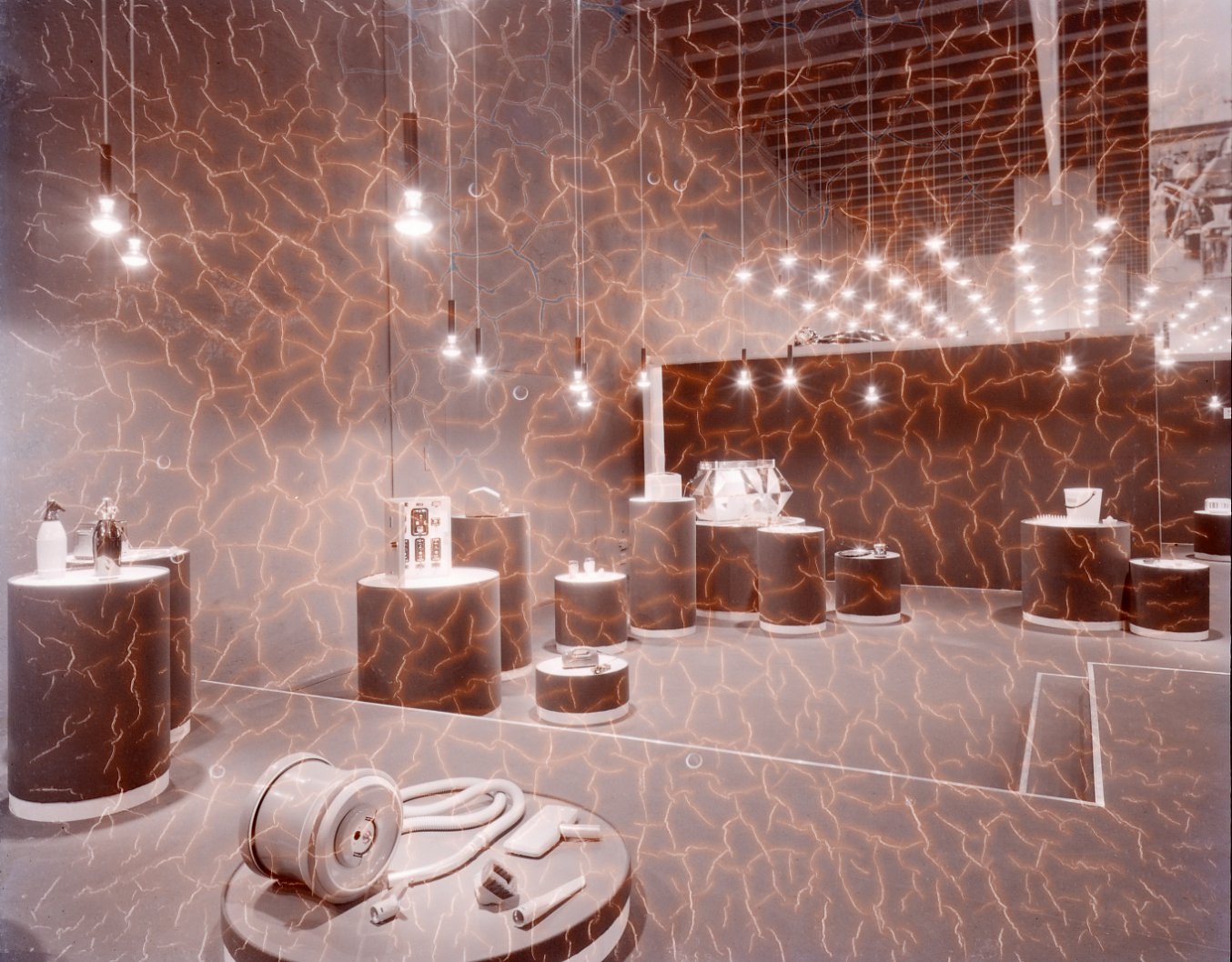 Servizio fotografico : Milano, 1957 / Paolo Monti. - Buste: 5, Fototipi: 5 : Negativo b/n, gelatina bromuro d'argento/ pellicola ; 10x12. - ((Serie costituita da 5 negativi identificati con i nn.: 21306, 21322, 21326-21328. La suddetta serie è contenuta nella scatola identificata con la numerazione 21282-21347. Sulla scatola manoscritto con pennarello nero: "XI T - 1957/ 2001-2100". La scatola è a sua volta contenuta in una scatola grande col coperchio giallo. - Occasione: Documentazione della XI Triennale del 1957, intitolata "Eclettismo-formalismo: Esposizione internazionale delle arti decorative e industriali moderne e dell'architettura moderna". L'esposizione si tenne presso il Palazzo dell'Arte.